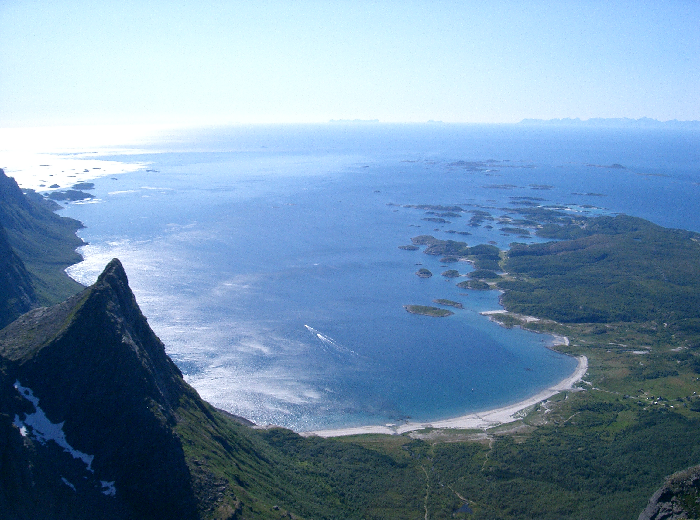 Brennviksanden, Steigen, Nordland, Norway.